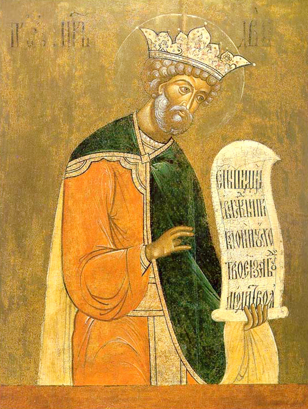 Из иконостаса церкви Чудо в Хонех Чудова монастыря Московского Кремля. Первая треть XVII века. Дерево, темпера. Размер - 90 х 67 см. Московский Кремль.